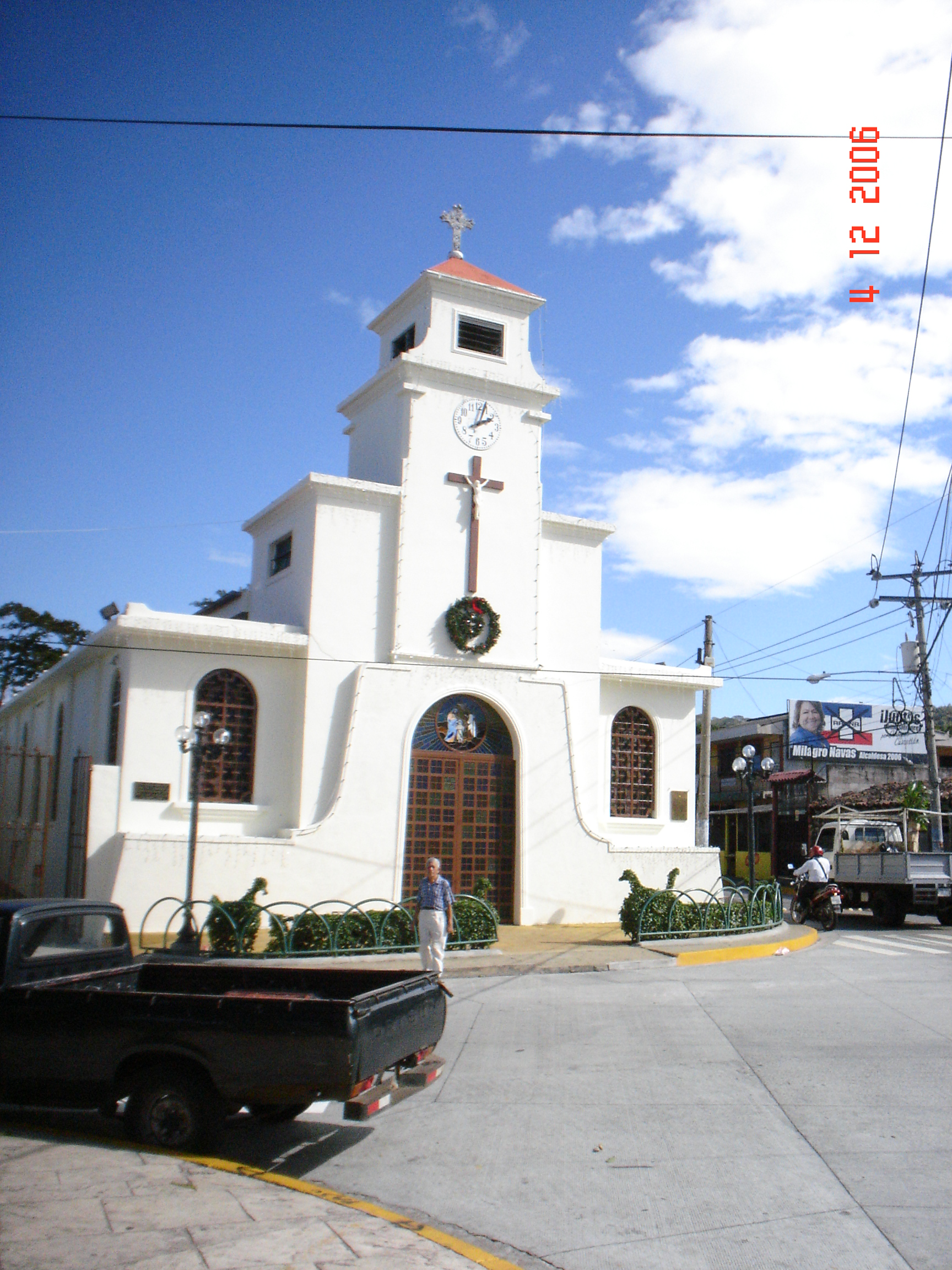 Fotografia de la parroquia de antiguo cuscatlan